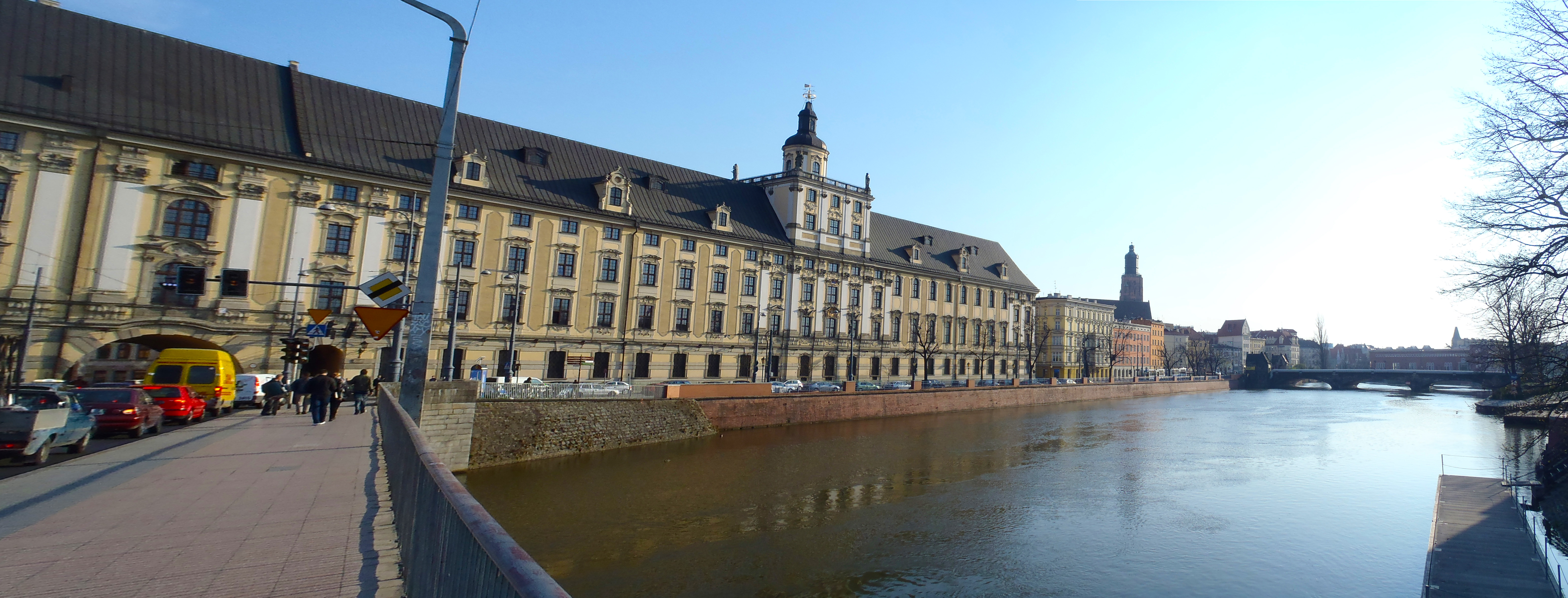 Stare Miasto, Wrocław, Poland